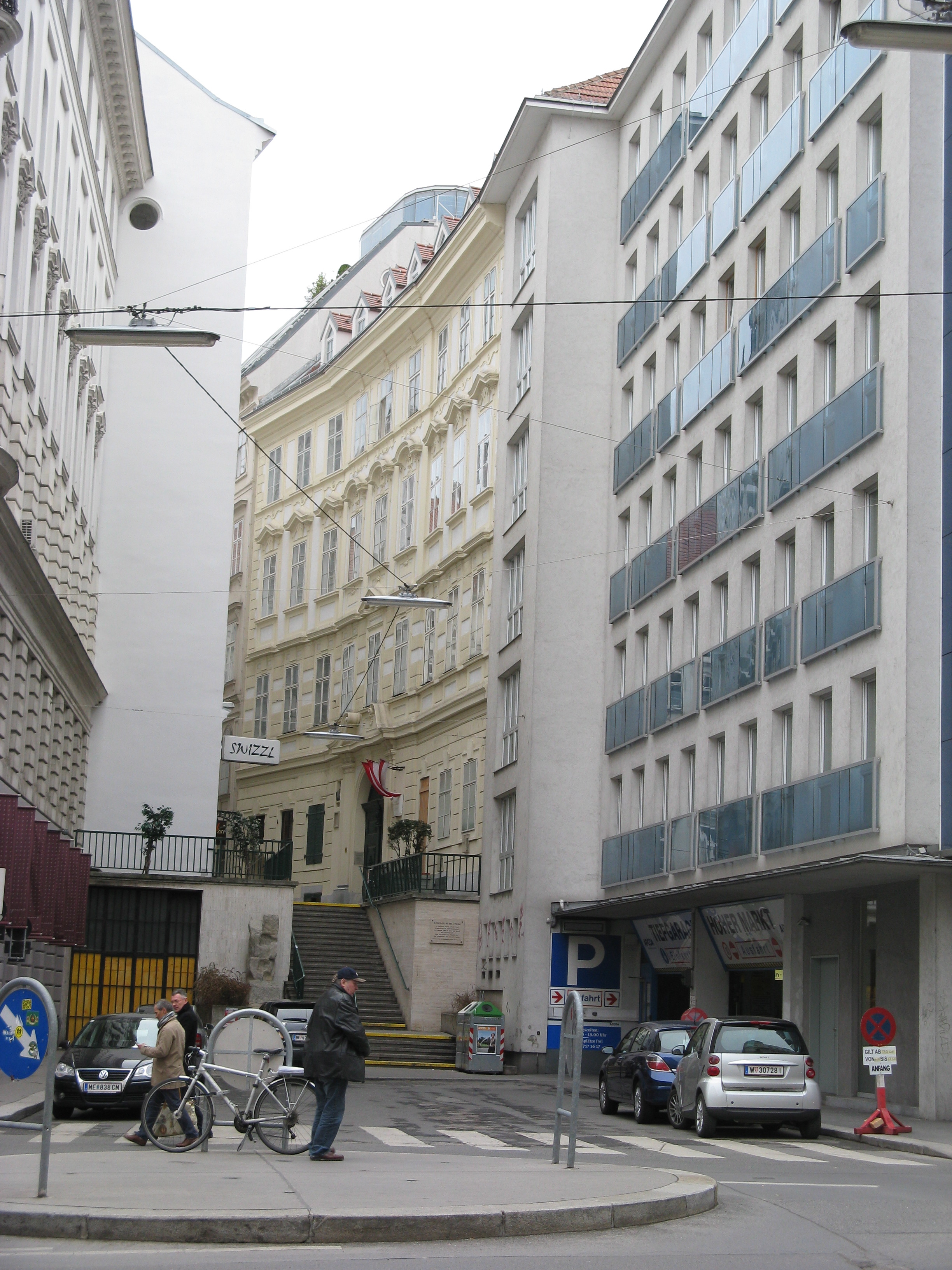 Theodore Herzl Stiege, Vienna.